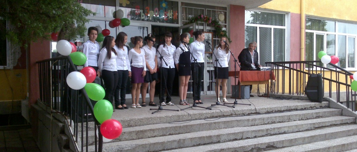 СОУ Васил Априлов - училищен празник